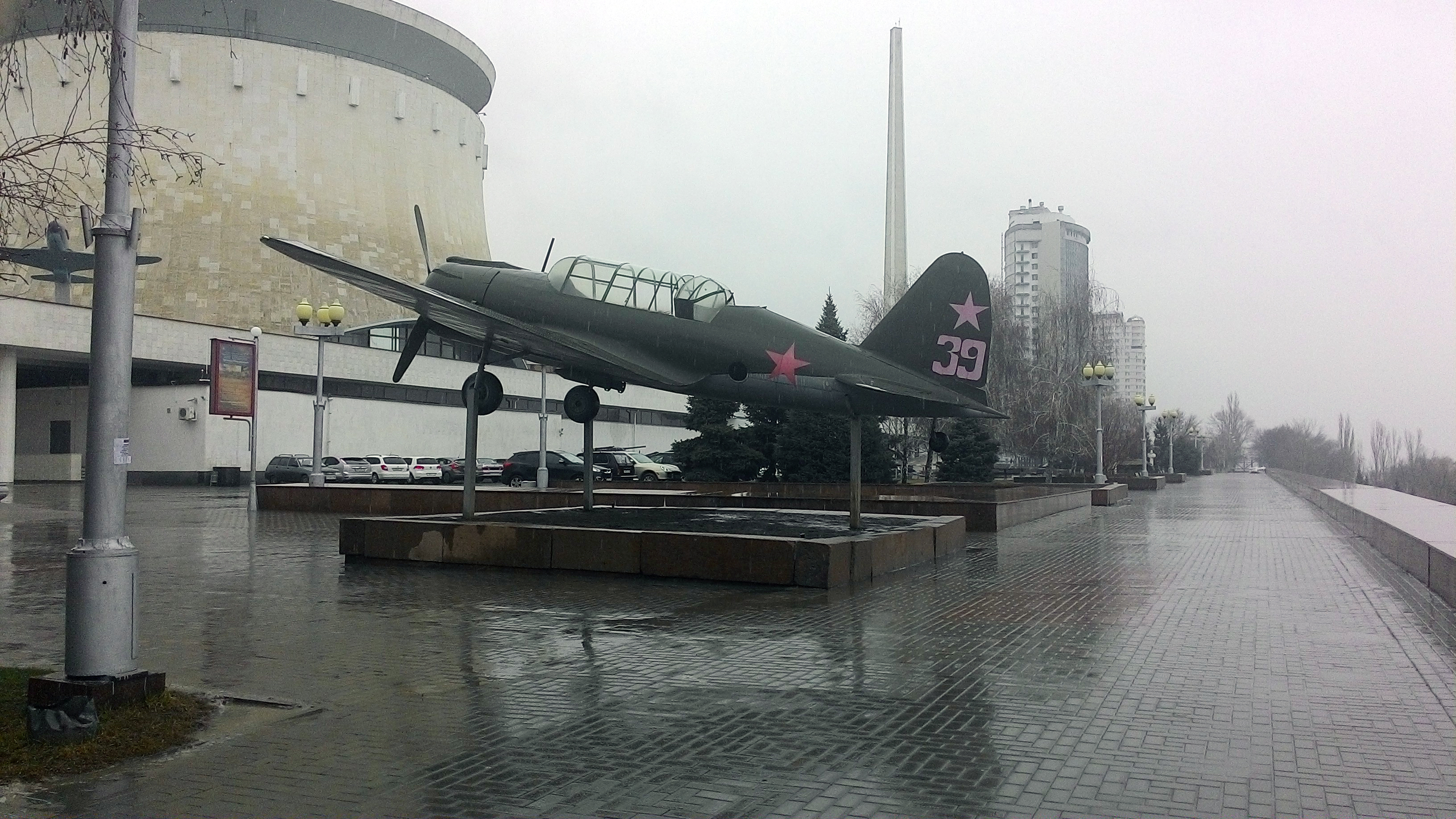 Панорама - СУ-2 ОКБ Сухой